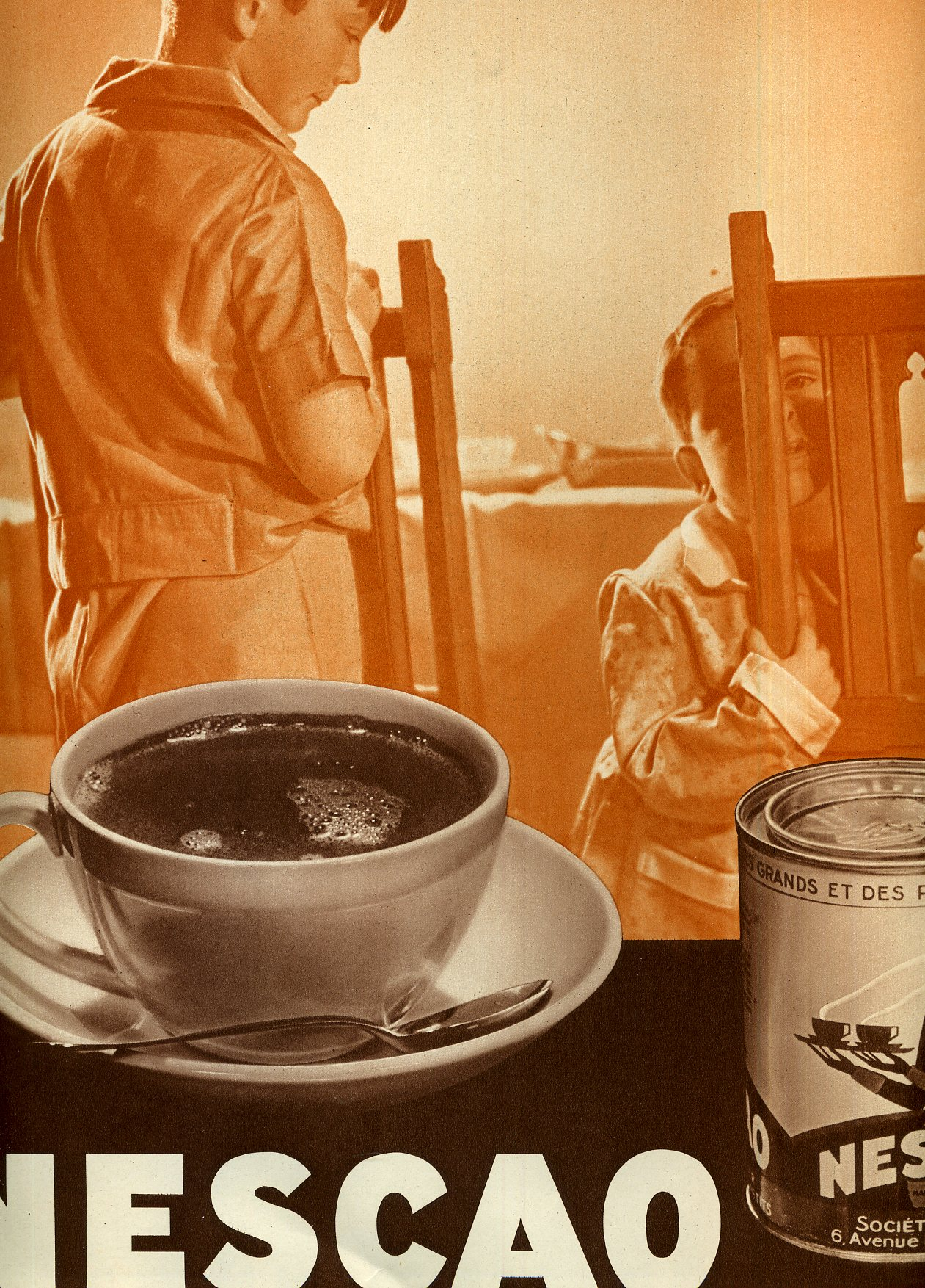 Nestlé